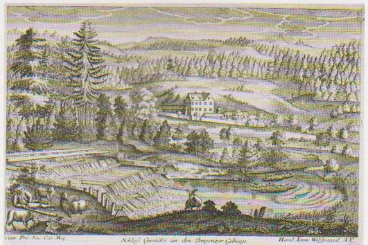 Kupferstich des Schlosses Gwiggen um 1710 in Hohenweiler, Vorarlberg, Austria.